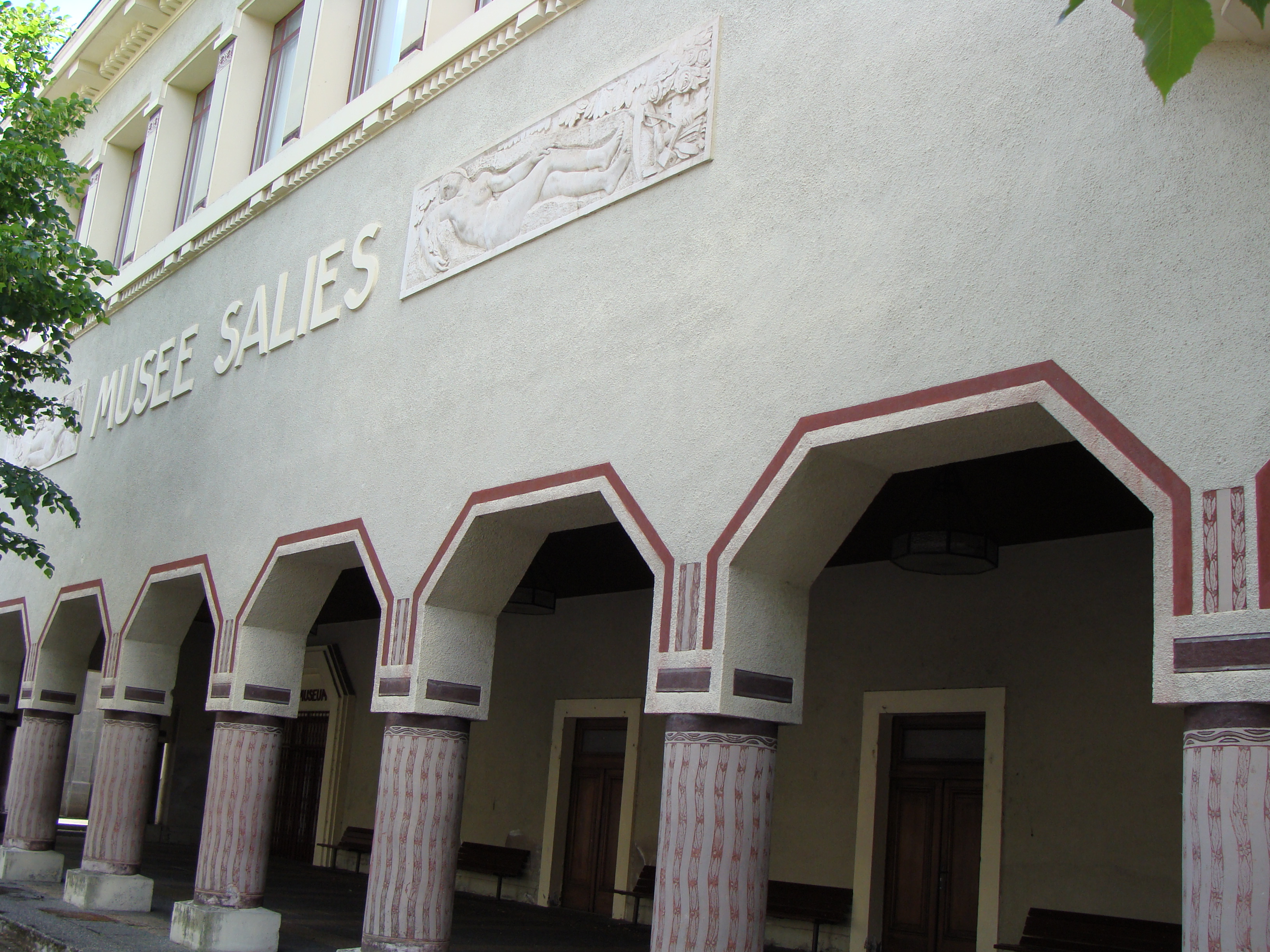 Bagnères-de-Bigorre - Musée Salies